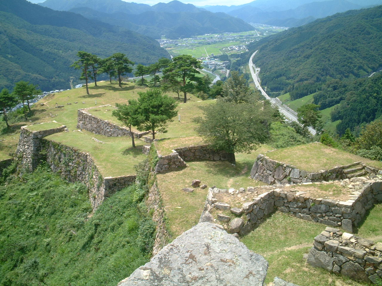 夏の竹田城